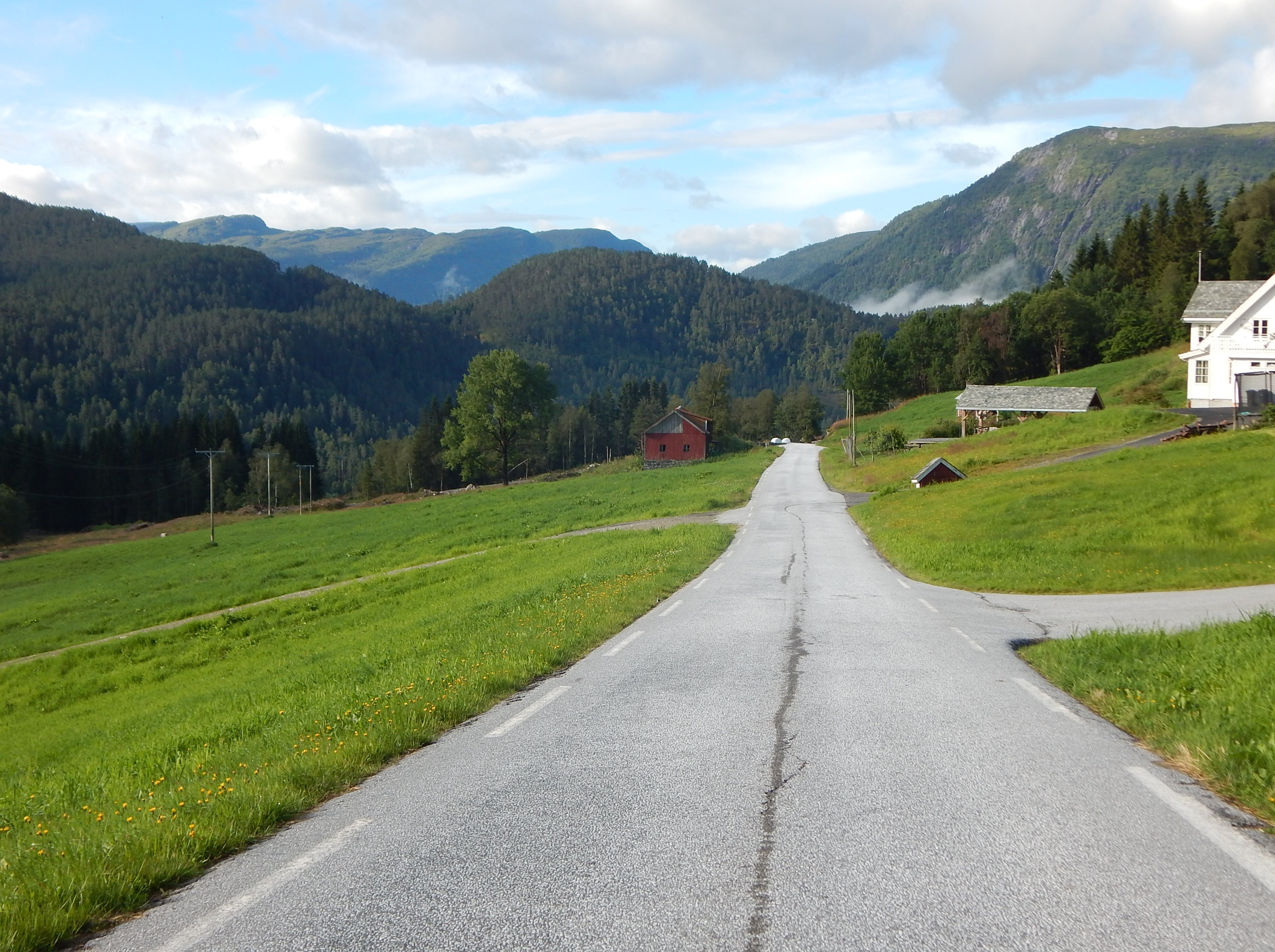 Fylkesvei 422 mellom Bringeland og Osen bru